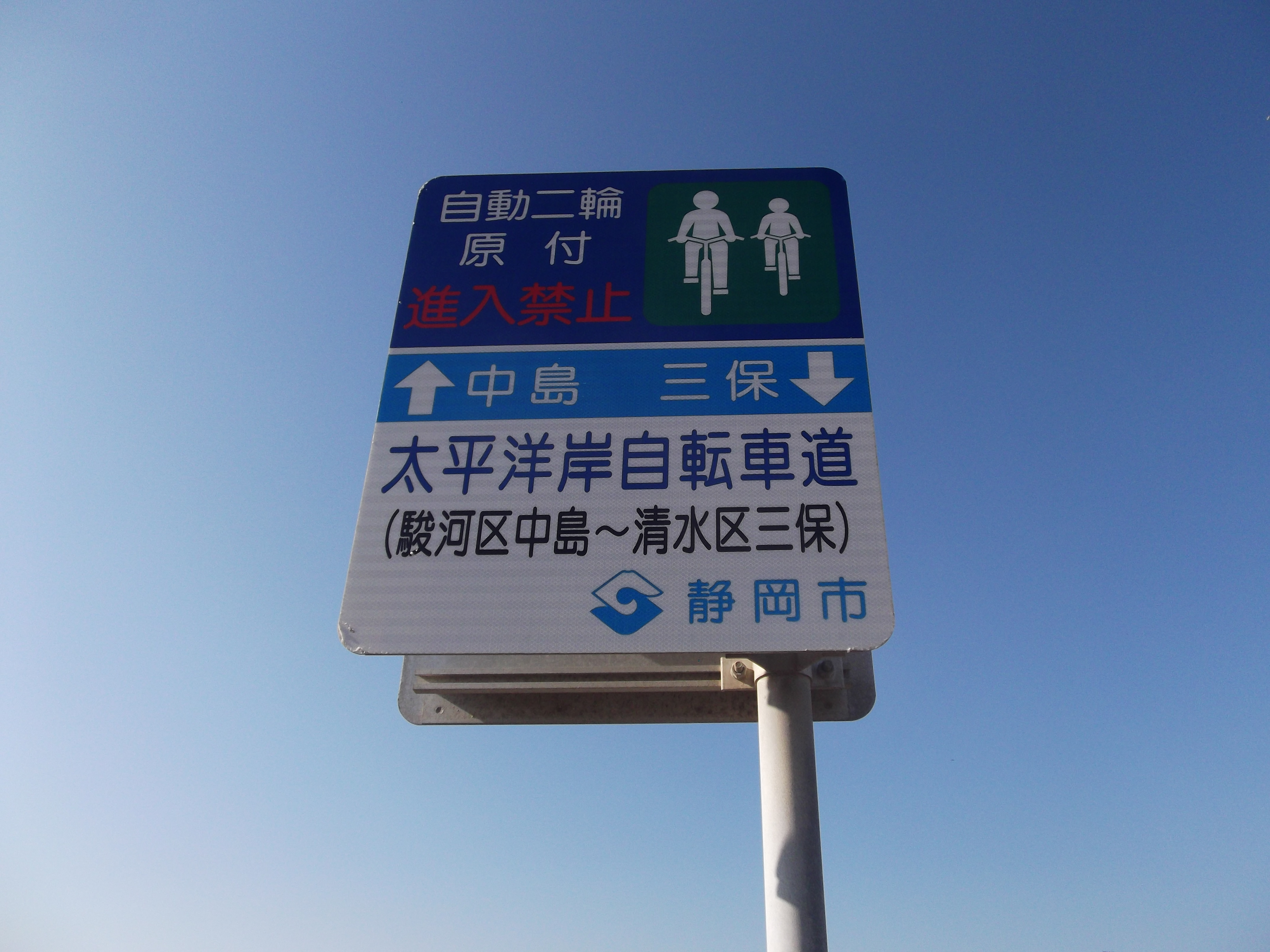 静岡市にある太平洋岸自転車道の標識